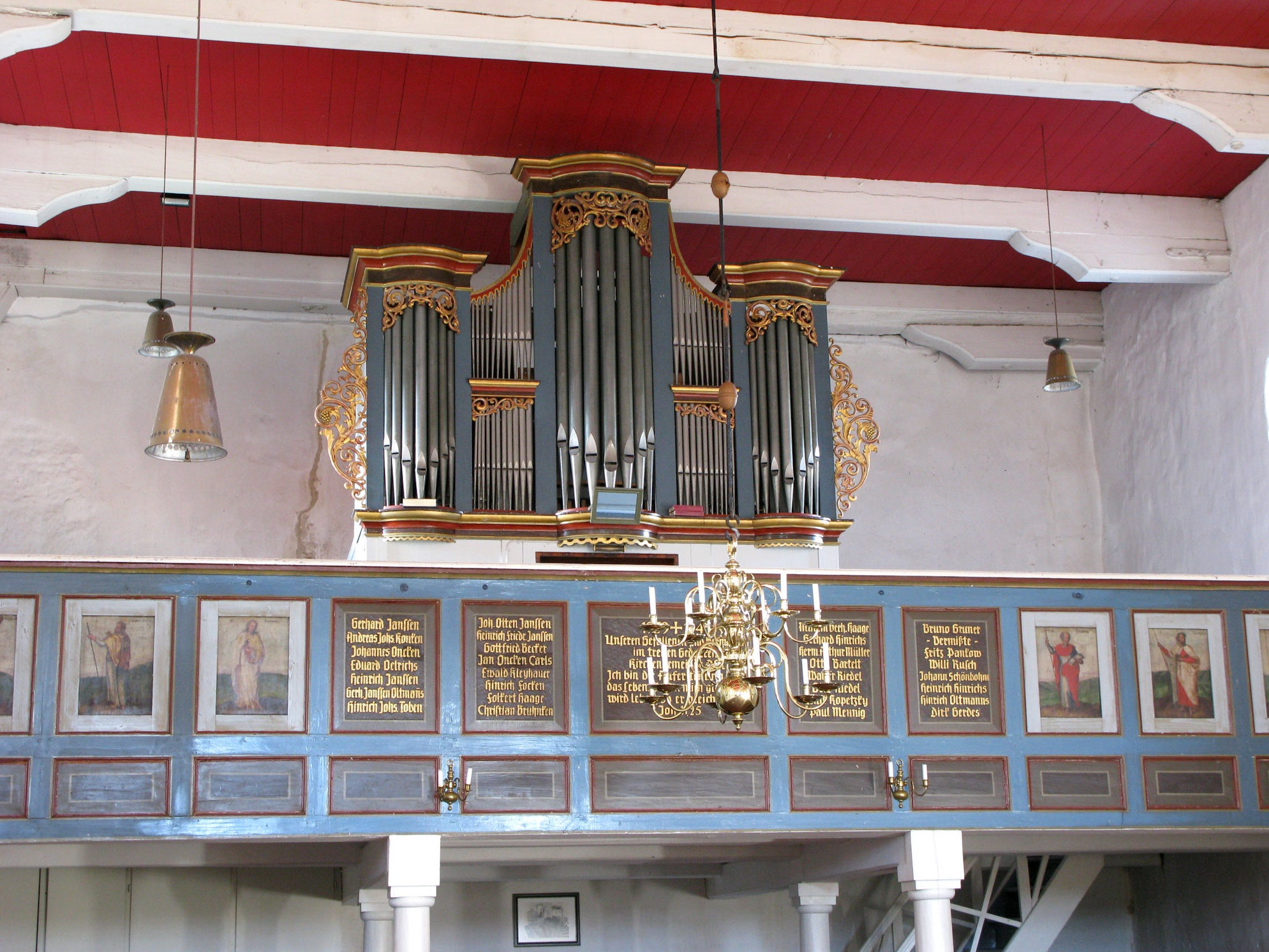 Orgel in Asel, Landkreis Wittmund